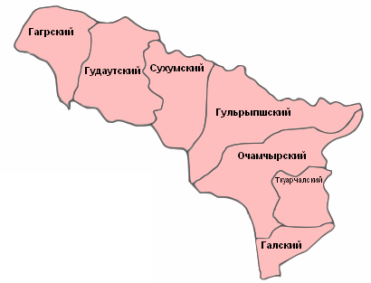 Районы Республики Абхазия, русский язык Аҧсшәа: Административ-территориалтә ашара, русский бызшәа